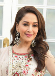 Madhuri Dixit promoting Kalank in Delhi, 2019